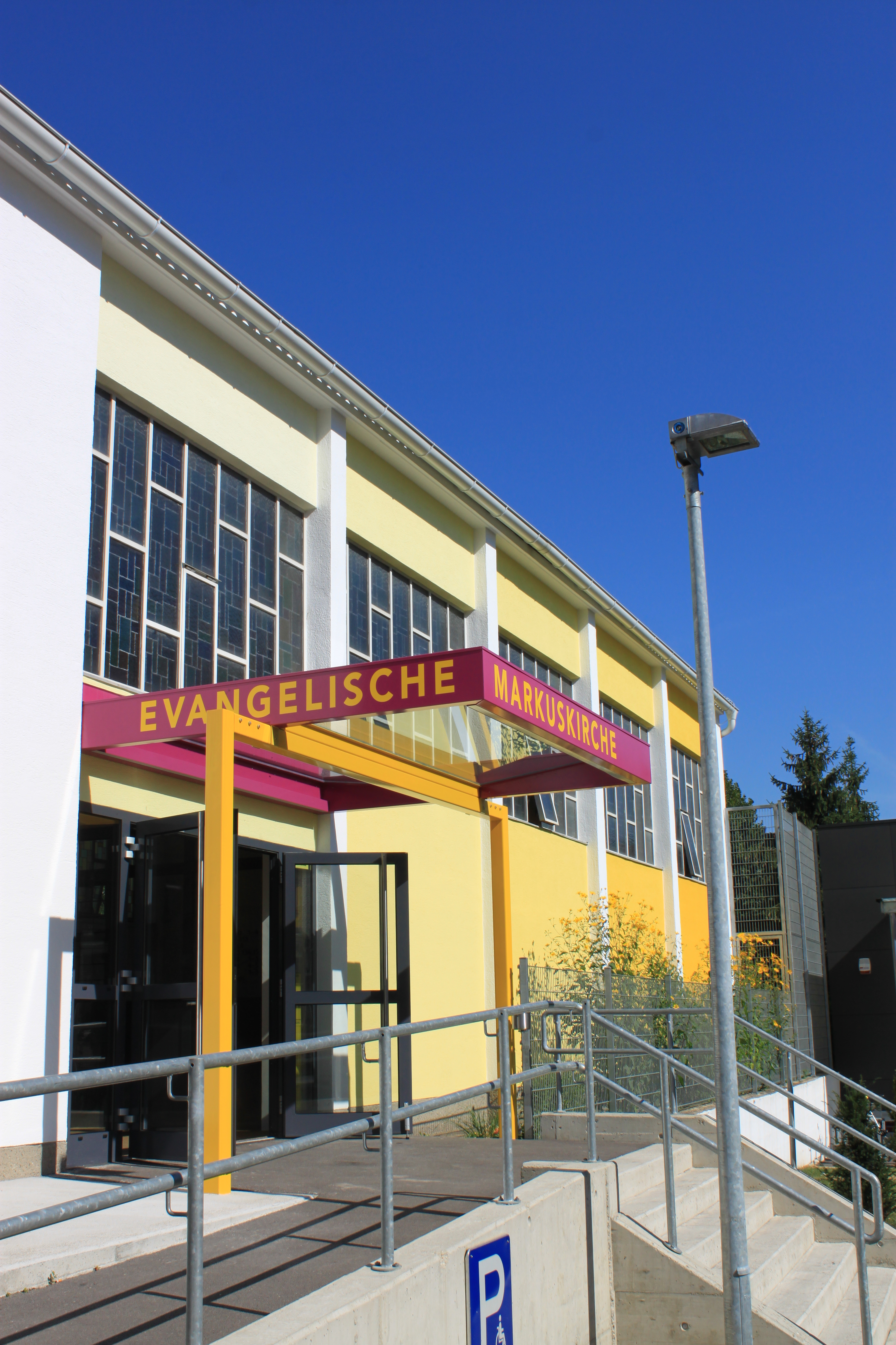 Der neue Eingang der evangelischen Markuskirche in Wien-Ottakring.